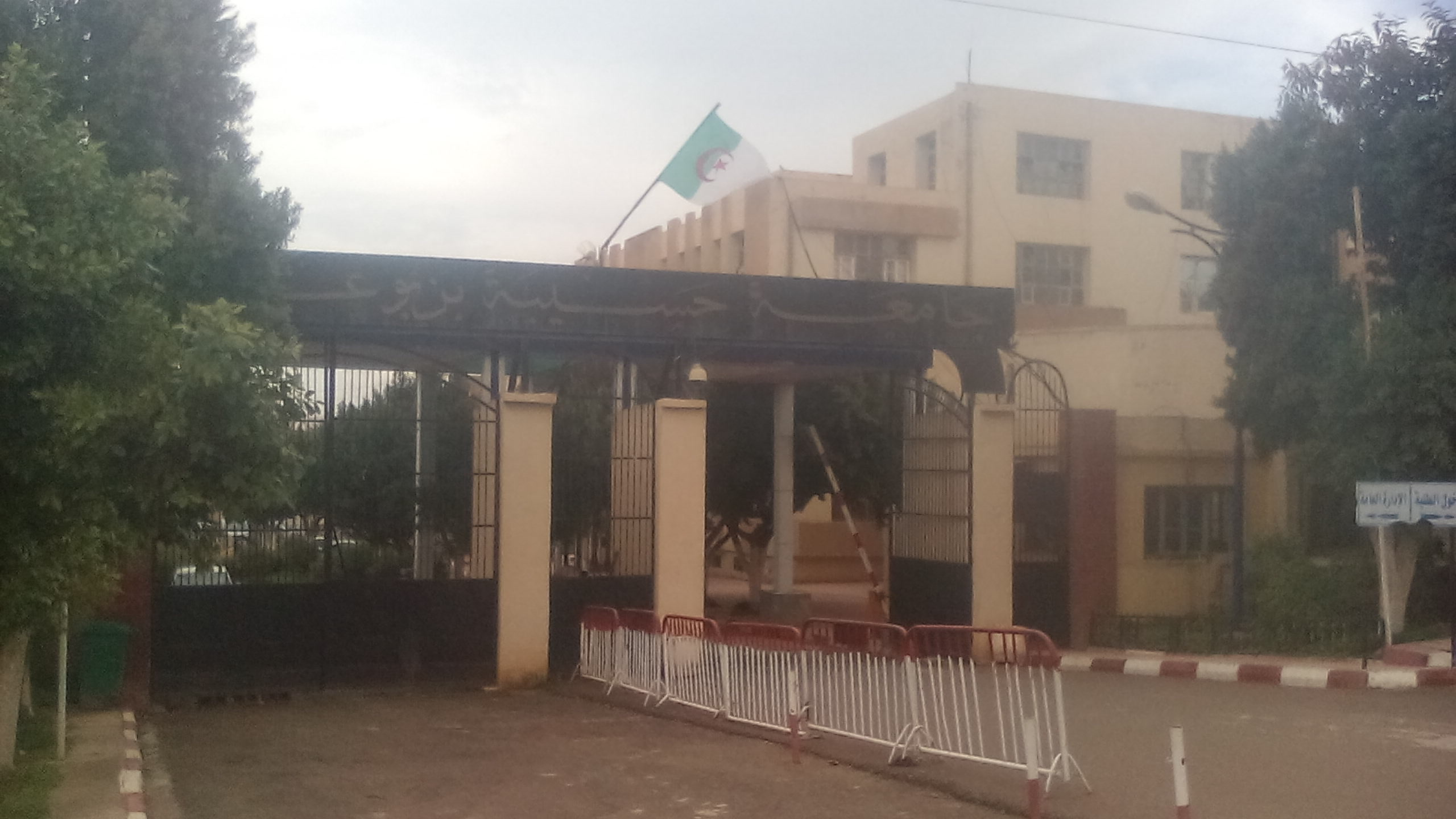 Université uhbc de hay Salem